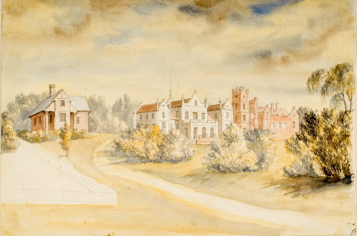 Беларуская (тарашкевіца): Астрашыцкі Гарадок (Astrašycki Haradok), сядзіба Тышкевічаў (Tyškievič)